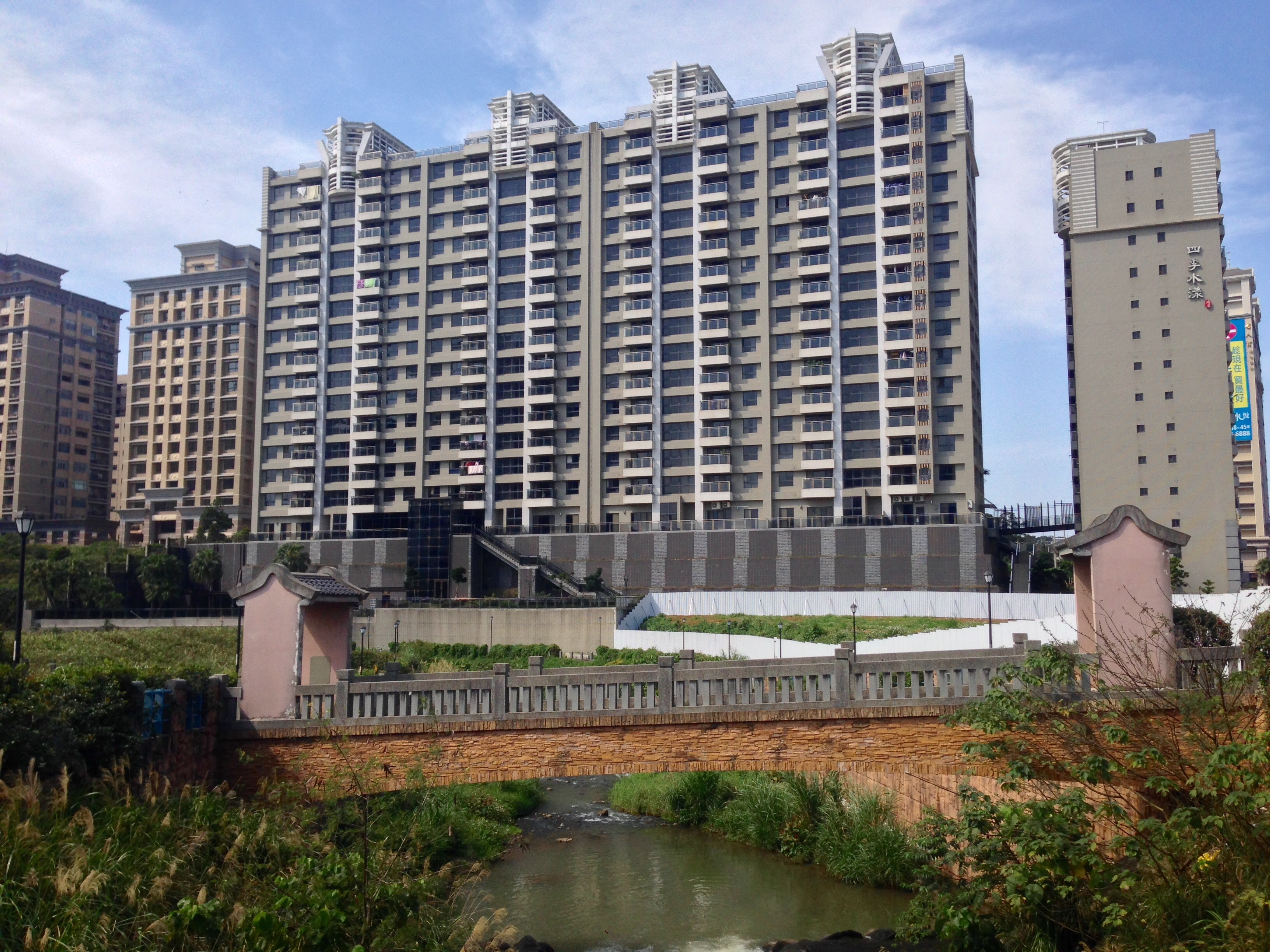 中文（台灣）: 新北市淡水區林子溪與公司田溪橋遺跡